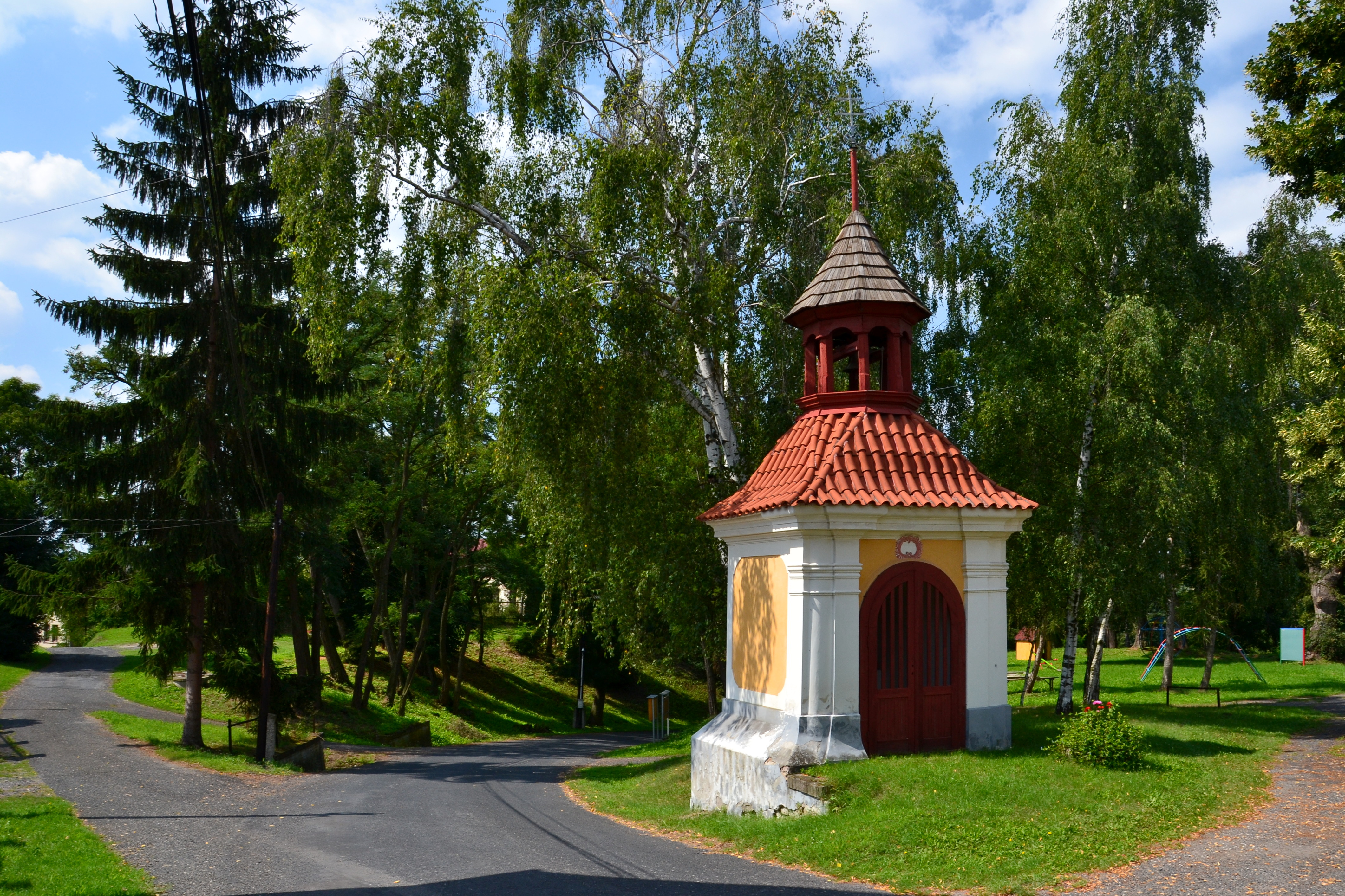 Kaple se zvonem (Stránky), střed obce, Stránky